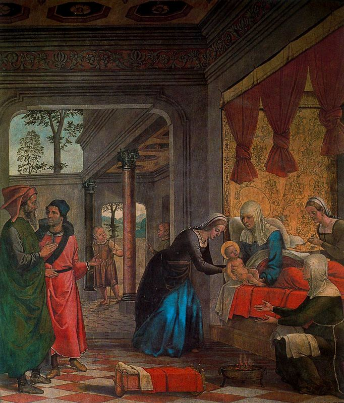 La obra representa el nacimiento de la Virgen María, madre de Jesucristo.